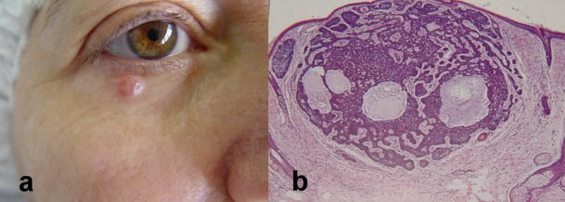 Exemplo de crescimento expansivo de tumor bem delimitado, no qual, o conceito de margem de segurança pode ser utilizado, mas com reservas.